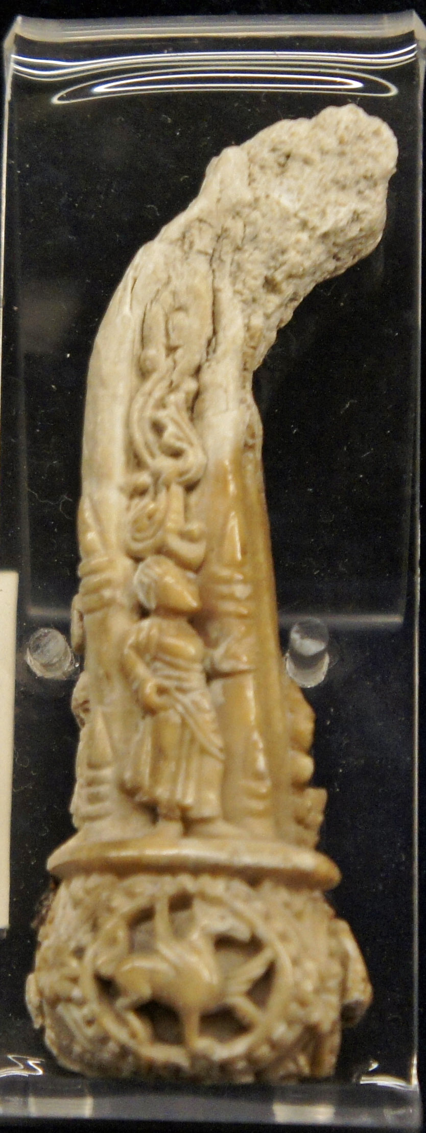 Volute de crosse d'Adalbéron d'Ardenne Xe siècle en ivoire.